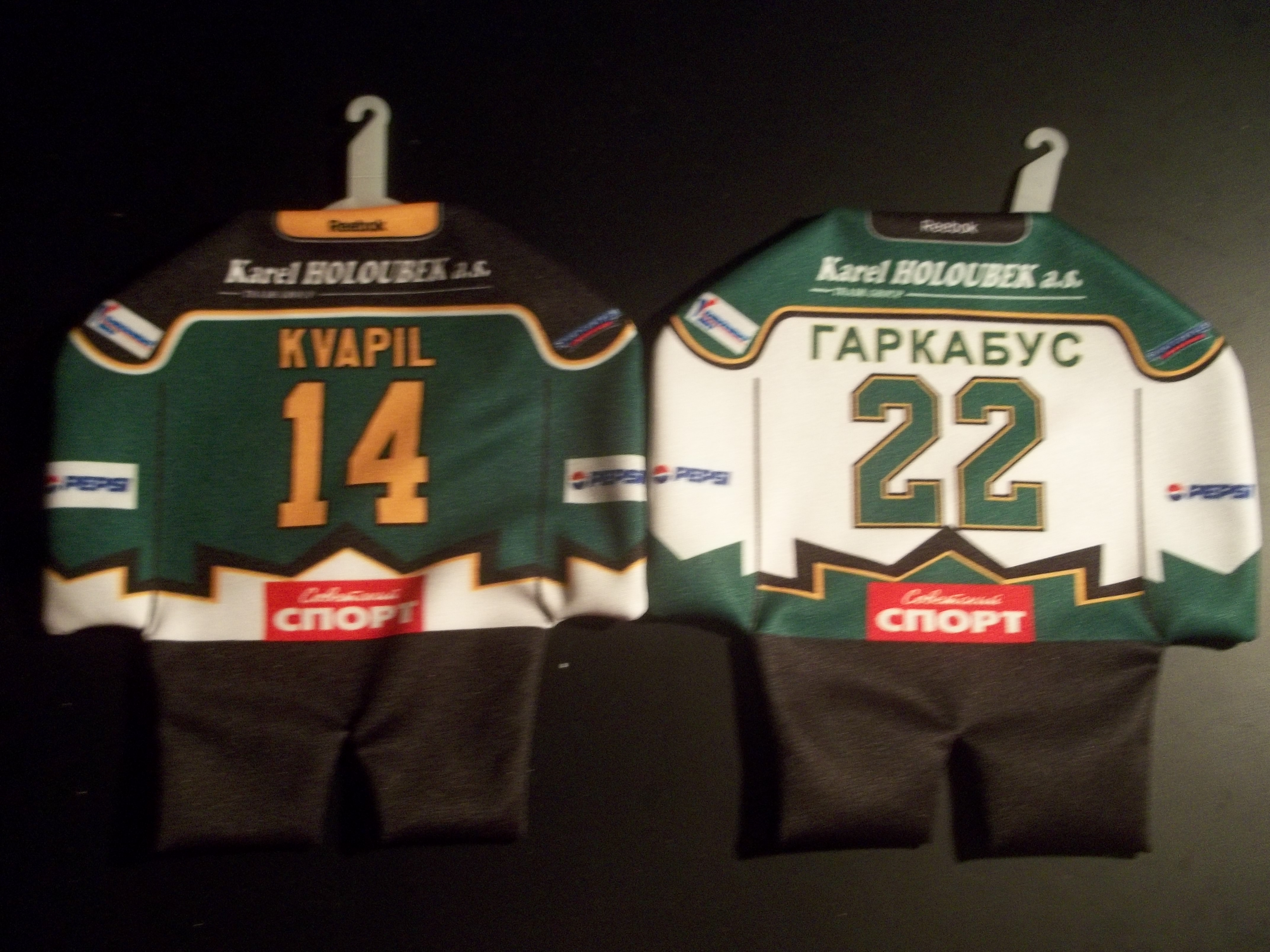 Vlčí smečka